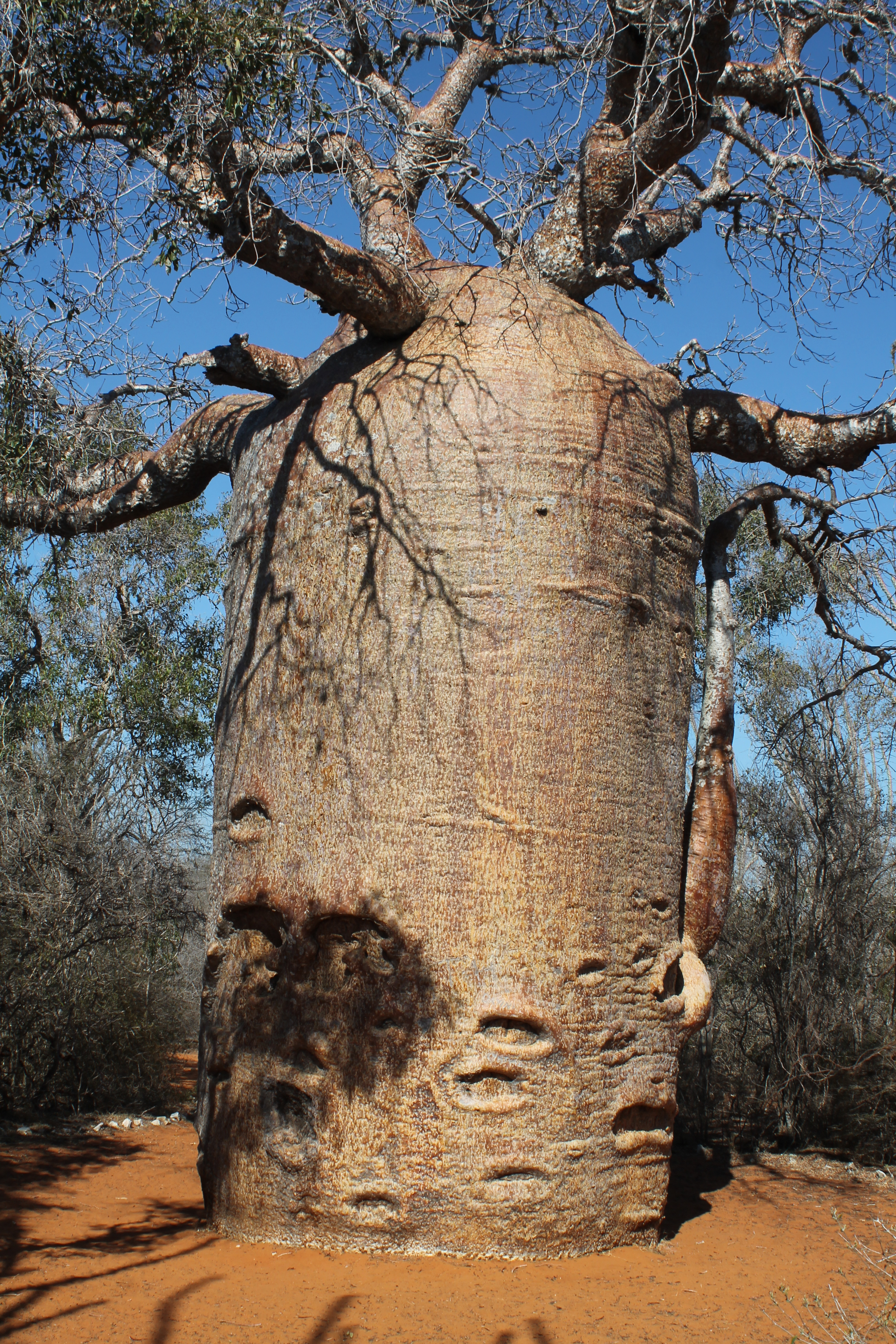 Spiny Forest in het Renialapark